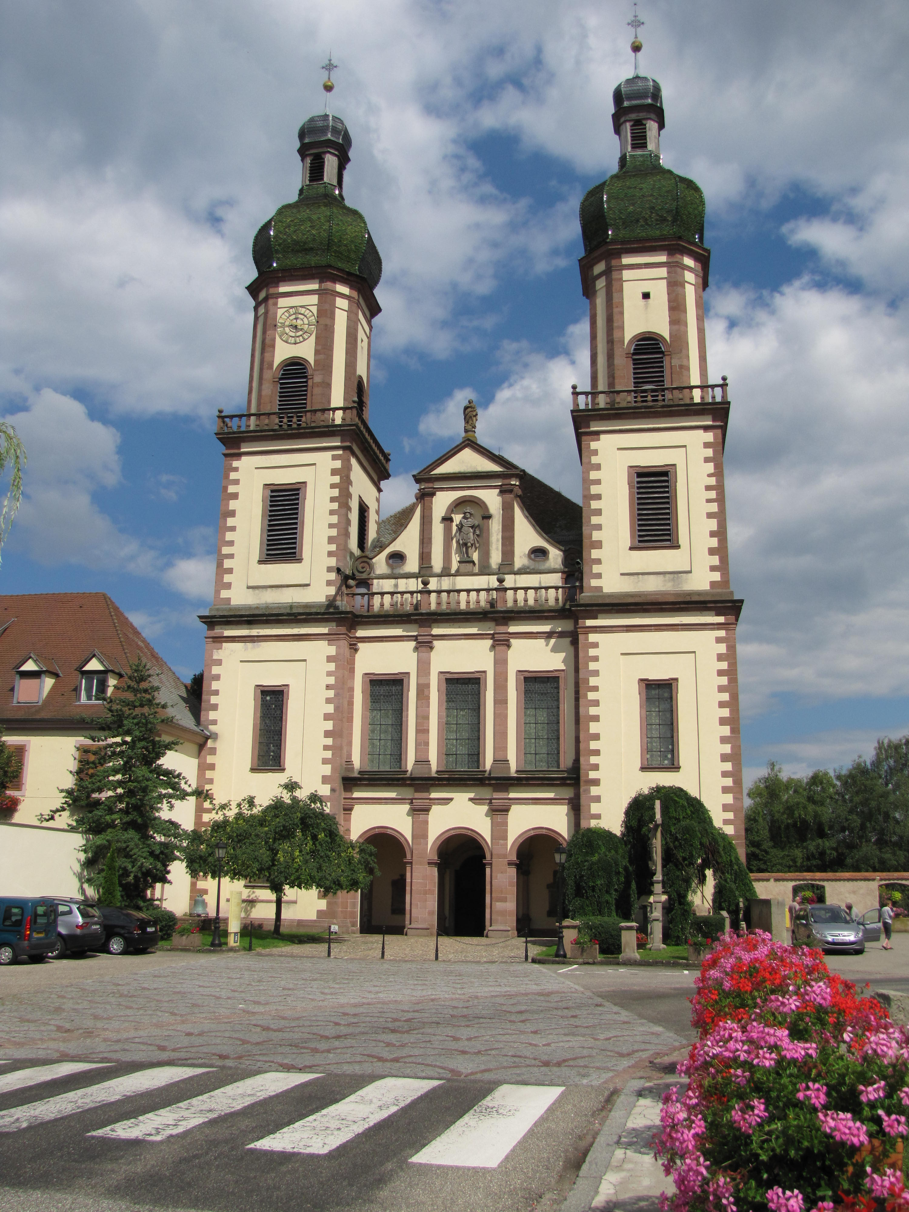 Alsace, Bas-Rhin, Église abbatiale Saint-Maurice d'Ebersmunster (PA00084701, IA00124485).